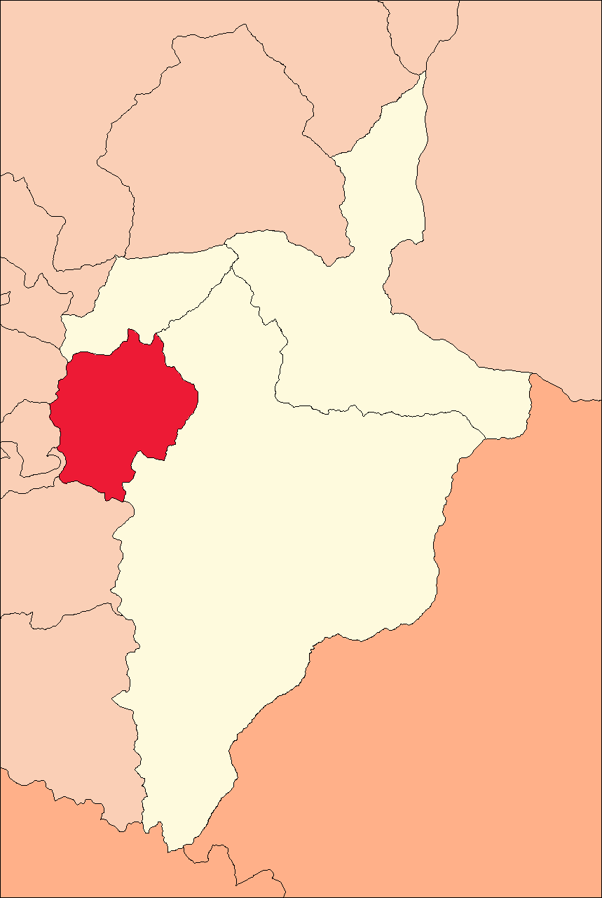 Área del distrito de Molino.